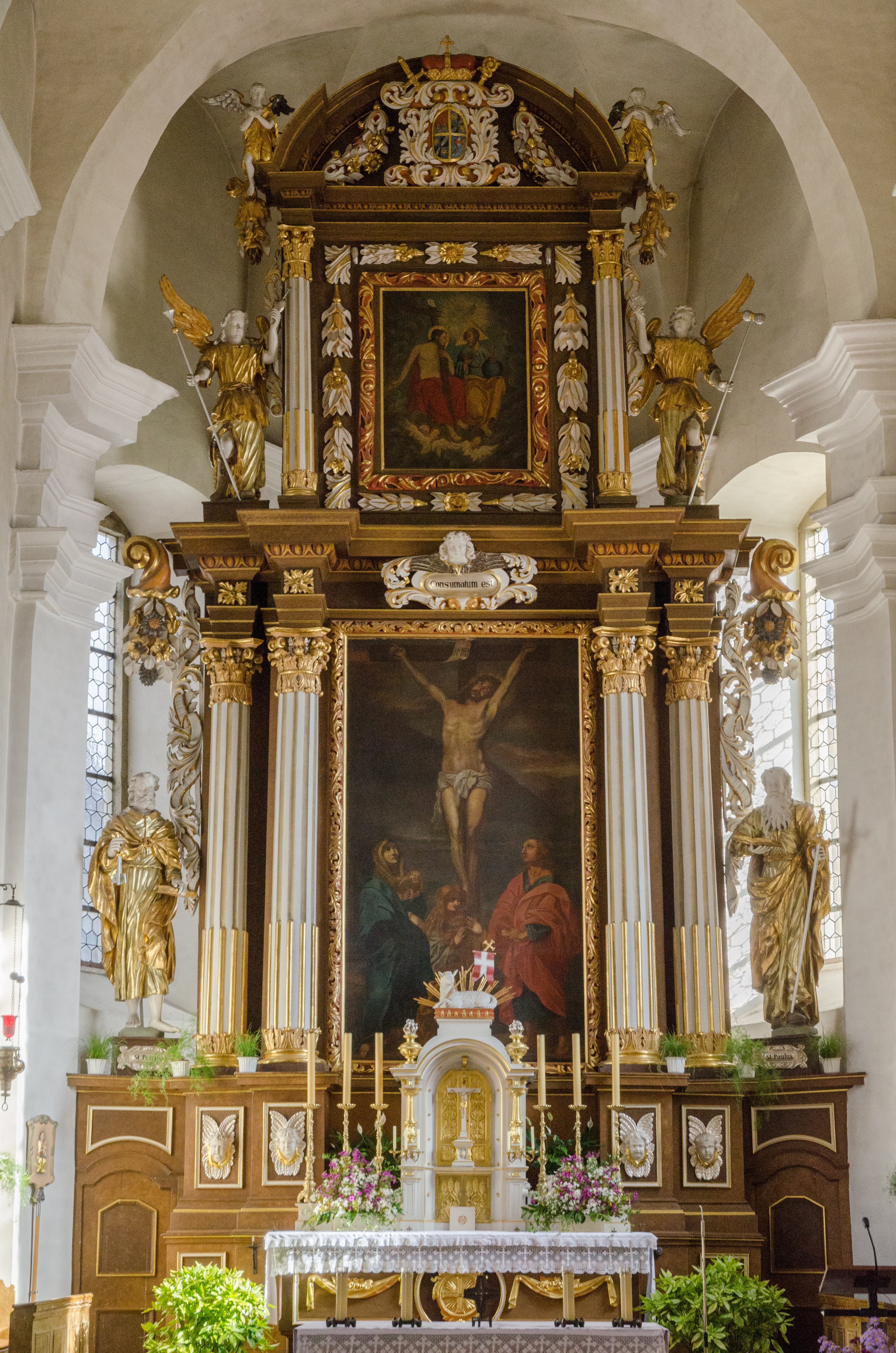 Burkardroth, St. Petrus in Ketten, Interior